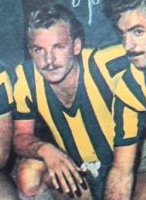 Ernesto Vidal